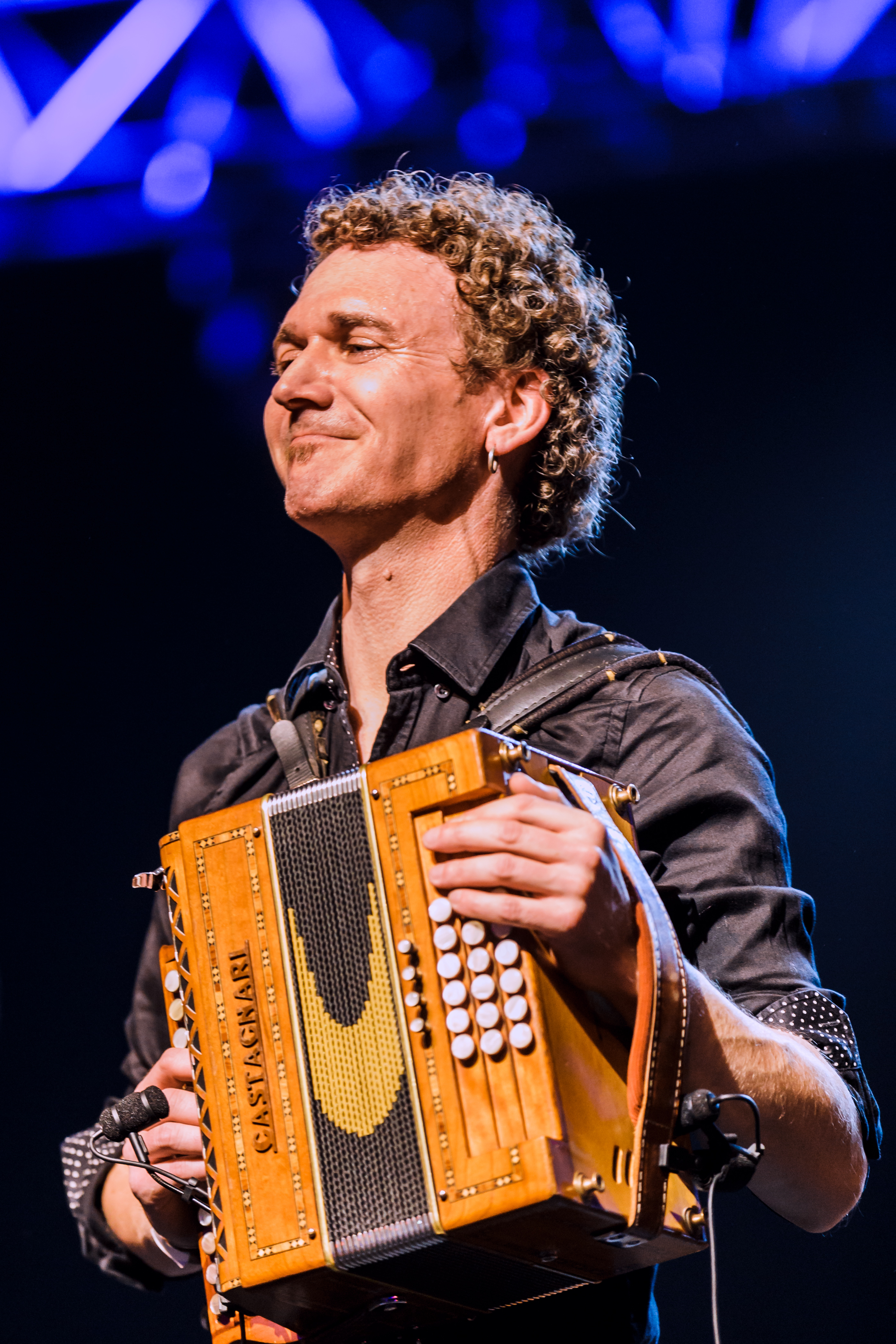 Création du duo Hamon Martin avec l'Orchestre Symphonique de Bretagne à l'occasion du grand fest-noz du festival Yaouank le 19 novembre 2016 au MusikHall du Parc Expo de Rennes.